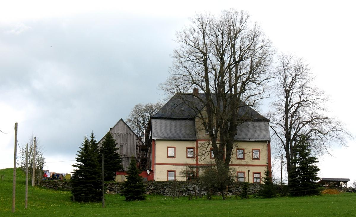 Rockstrohgut